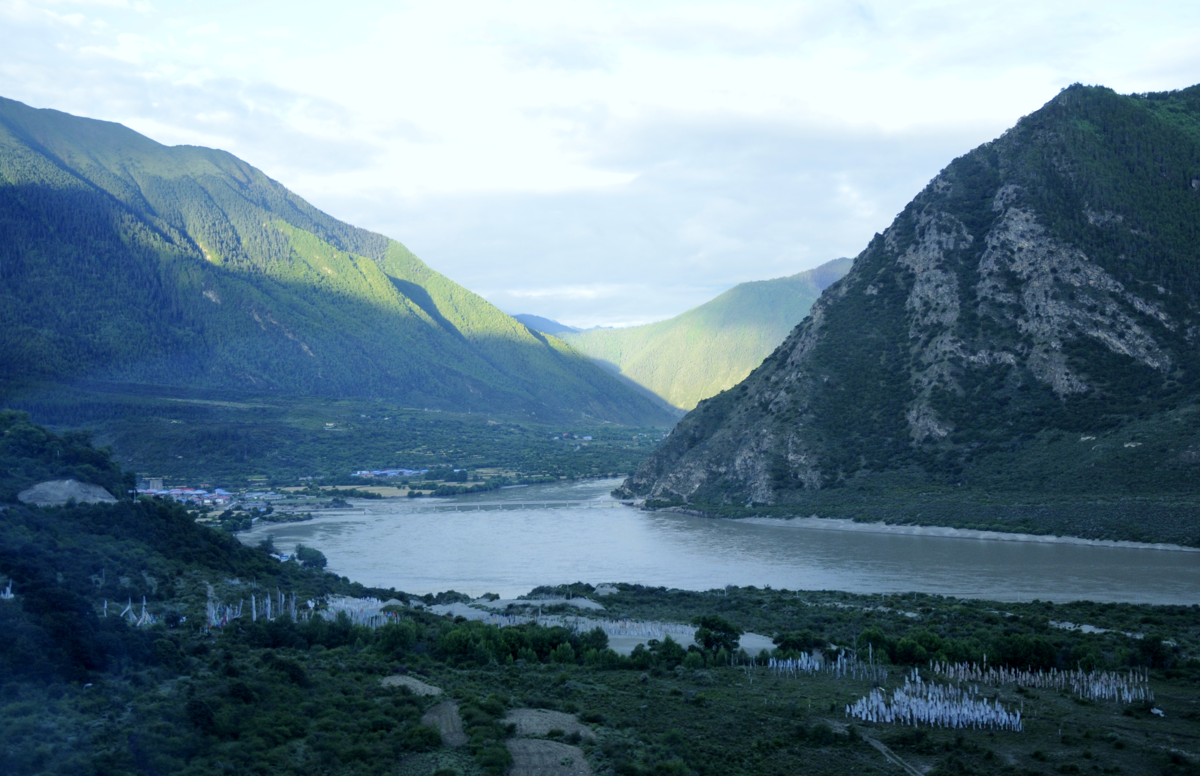 雅鲁藏布大峡谷